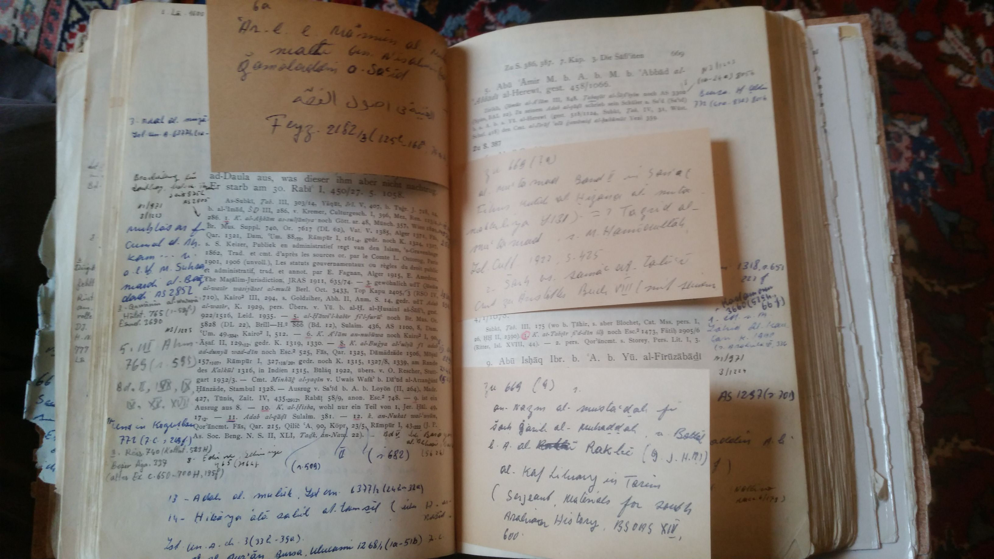 Aus einer Gelehrtenbibliothek. Brockelmann, Geschichte der arabischen Litteratur, Suppl. 1 (1937), mit Anmerkungen des Wissenschaftshistorikers Fuat Sezgin